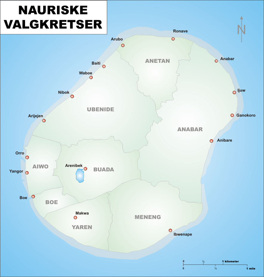 Kart over Naurus valgkretser.